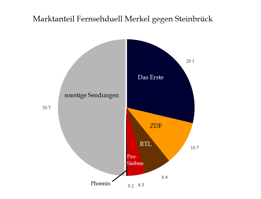 Marktanteil des Fernsehduells Merkel gegen Steinbrück